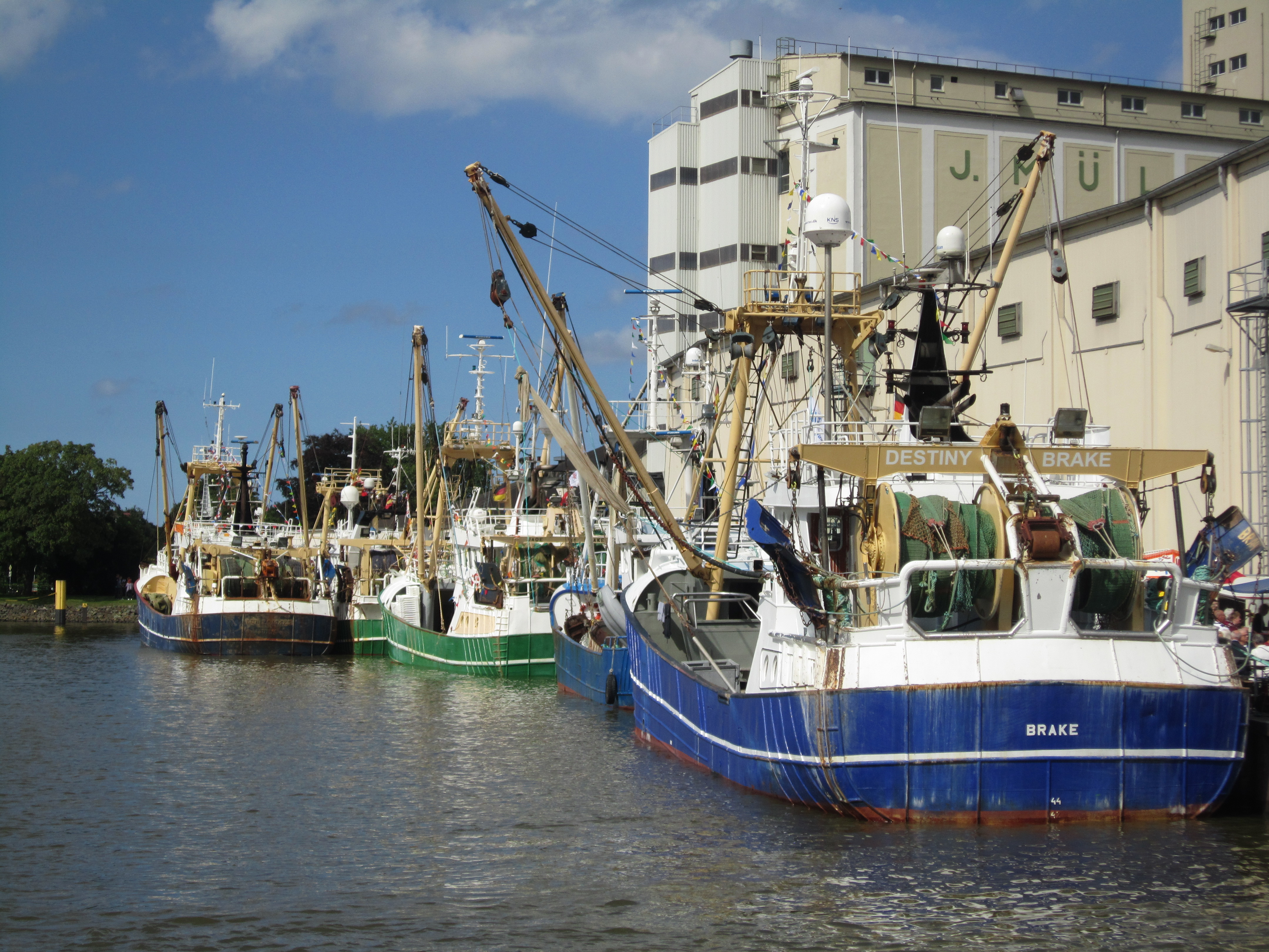 Braker Binnenhafen während des Hafenfestes 2016